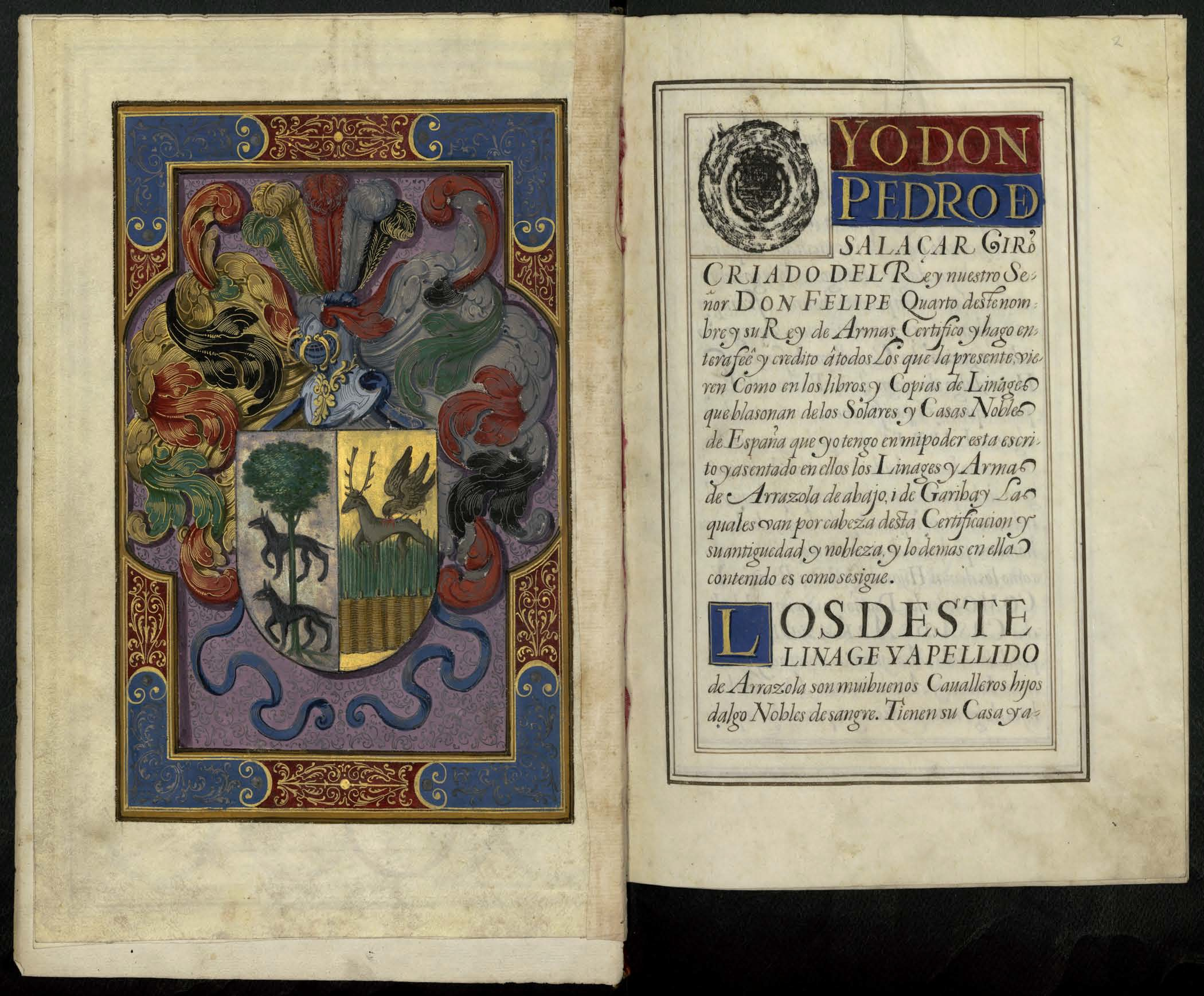 Realizada en torno a 1646, durante el reinado de Felipe IV, y certificada por el Rey de Armas don Pedro de Salazar a los Arrazola y Garibay, hidalgos guipuzcoanos originarios de Olavarrieta, villa cercana a Oñate.